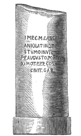 Dessin de la borne milliaire de JavolsLatina: Ref CIL 17-02, 00334 = CIL 13, 08883 = CAG-48, p 34 = CAG-48a, p 216 : Imp(eratori) C(aesari) M(arco) Cassi/anio Latinio Po/stumo Invicto / P(io) F(elici) Aug(us)t(o) pon(tifici) ma/ximo t(ribunicia) p(otestate) p(atri) p(atriae) co(n)s(uli) IIII / civit(as) Gab(alorum)